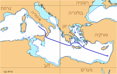 מסלול ההפלגה